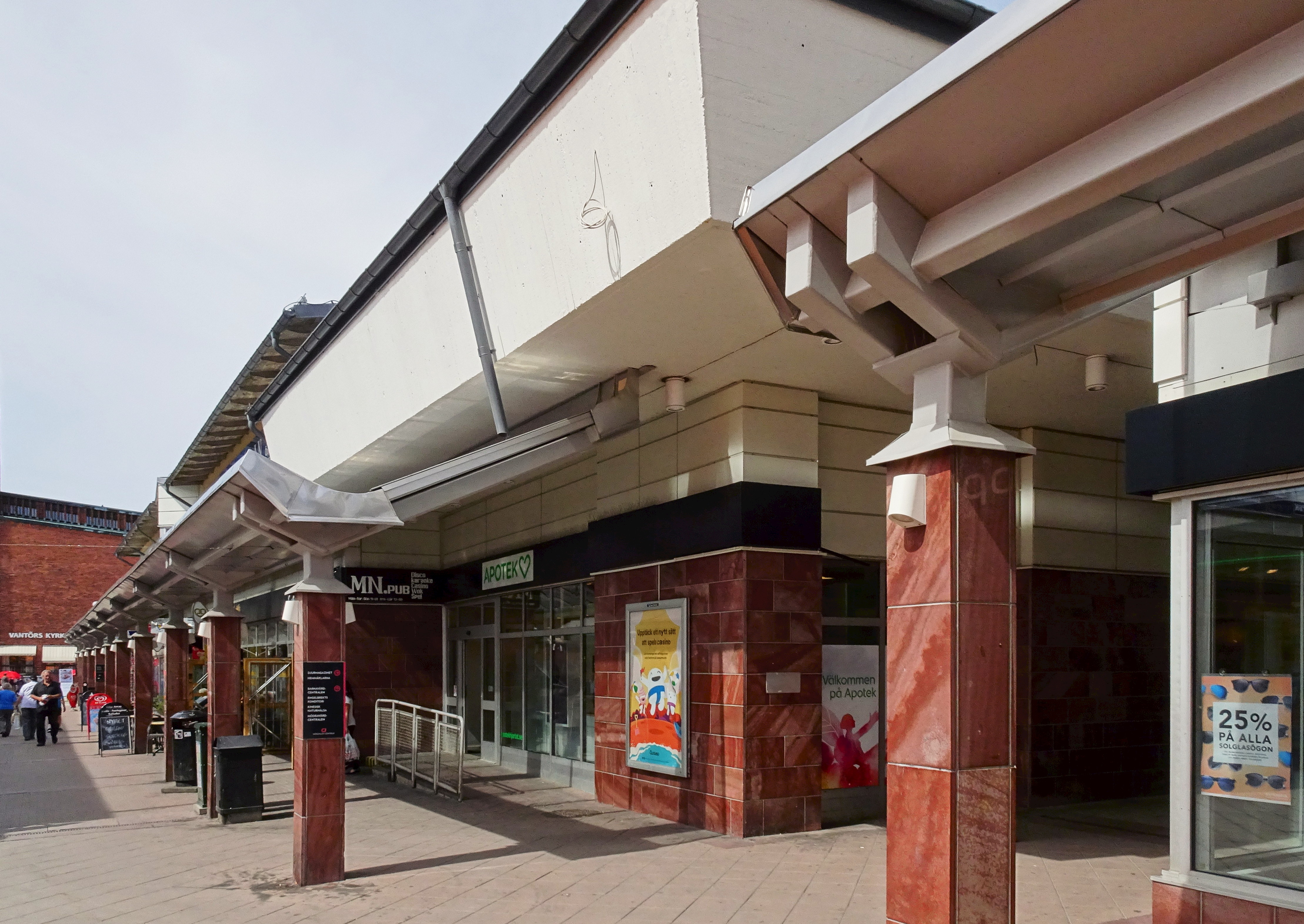 Före detta Biograf Rondos entré, Högdalsgången, Högdalens centrum.